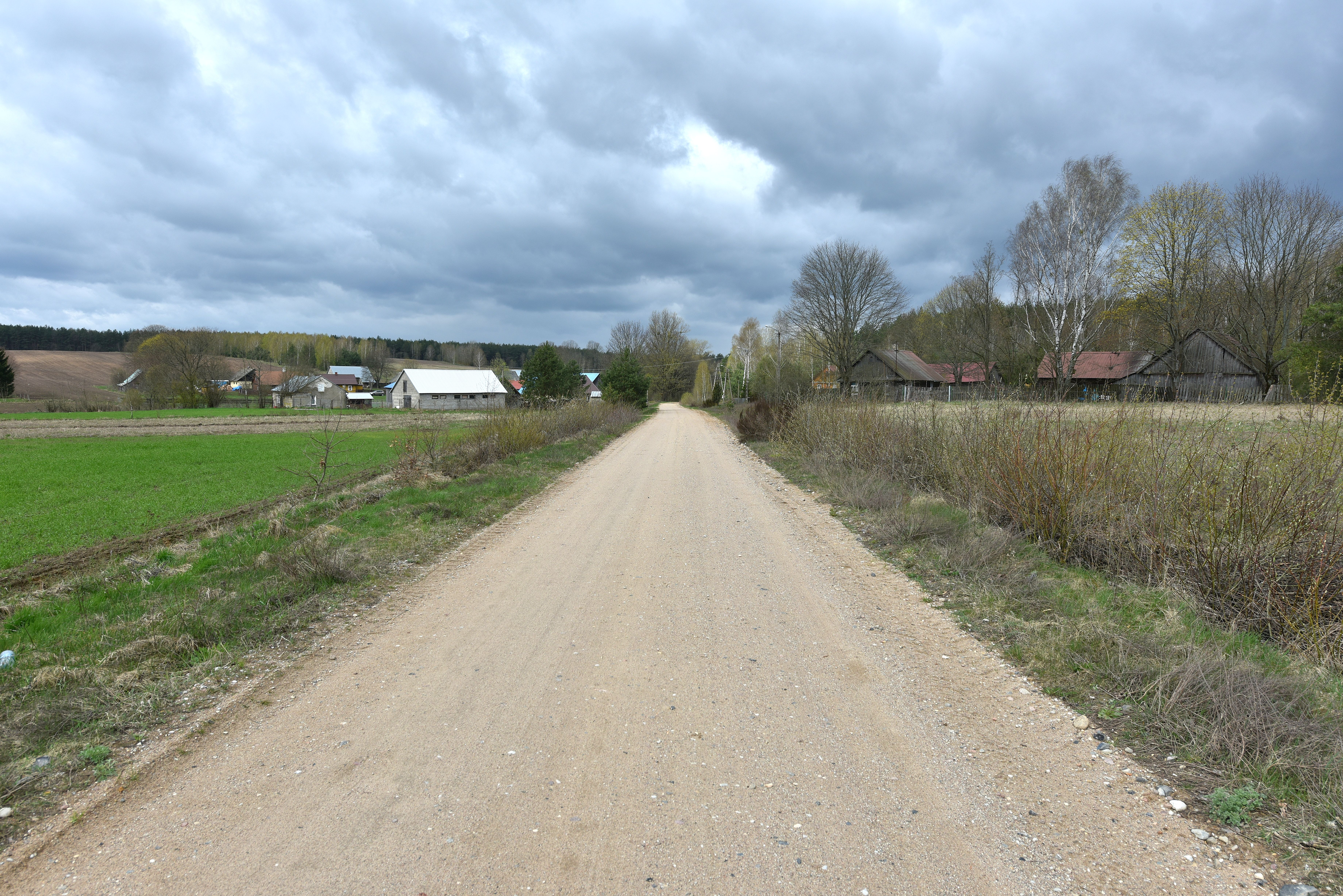 Wieś Zielona w gminie Gródek, województwo podlaskie